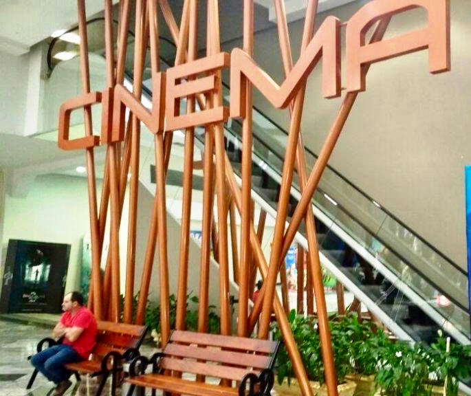 Escada rolante de acesso ao Lumière Cinemas instalado no Royal Plaza Shopping de Londrina